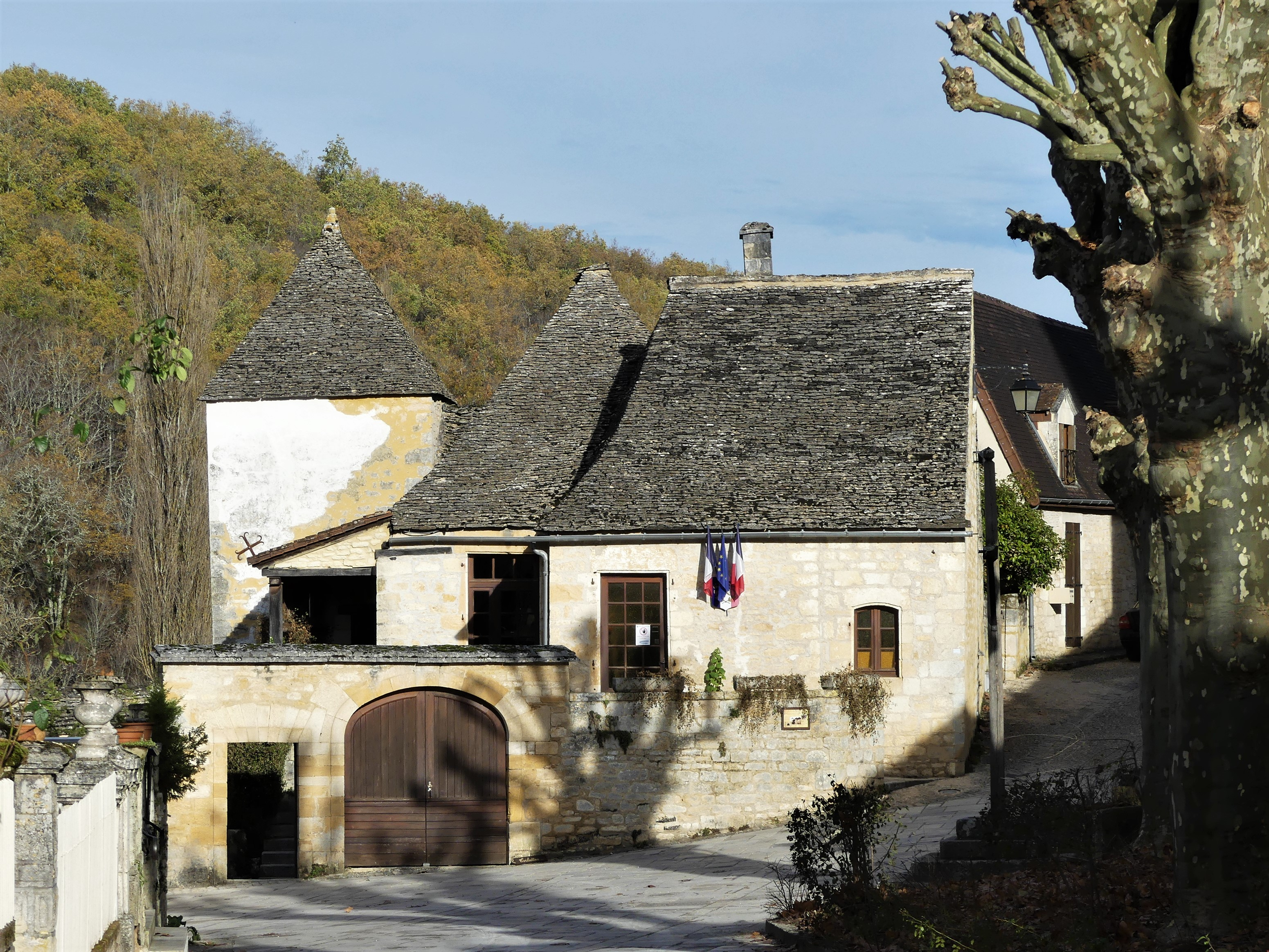 La mairie (ancien presbytère) de Saint-Amand-de-Coly, Dordogne, France.